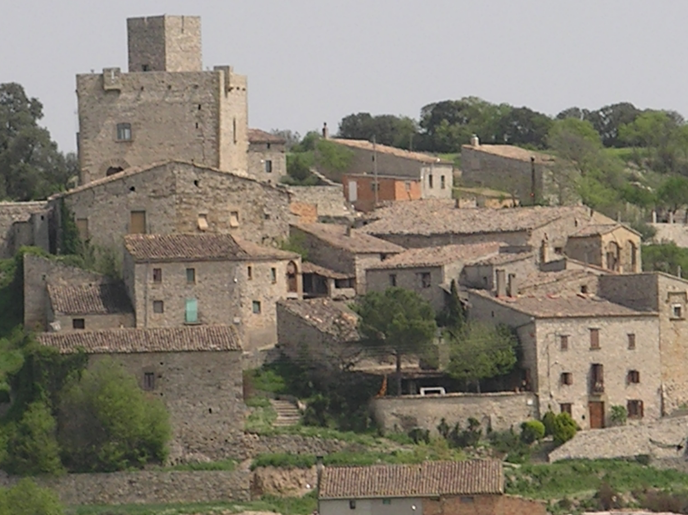 Vista del poble de Malgrat des de La Prenyanosa (La Segarra)